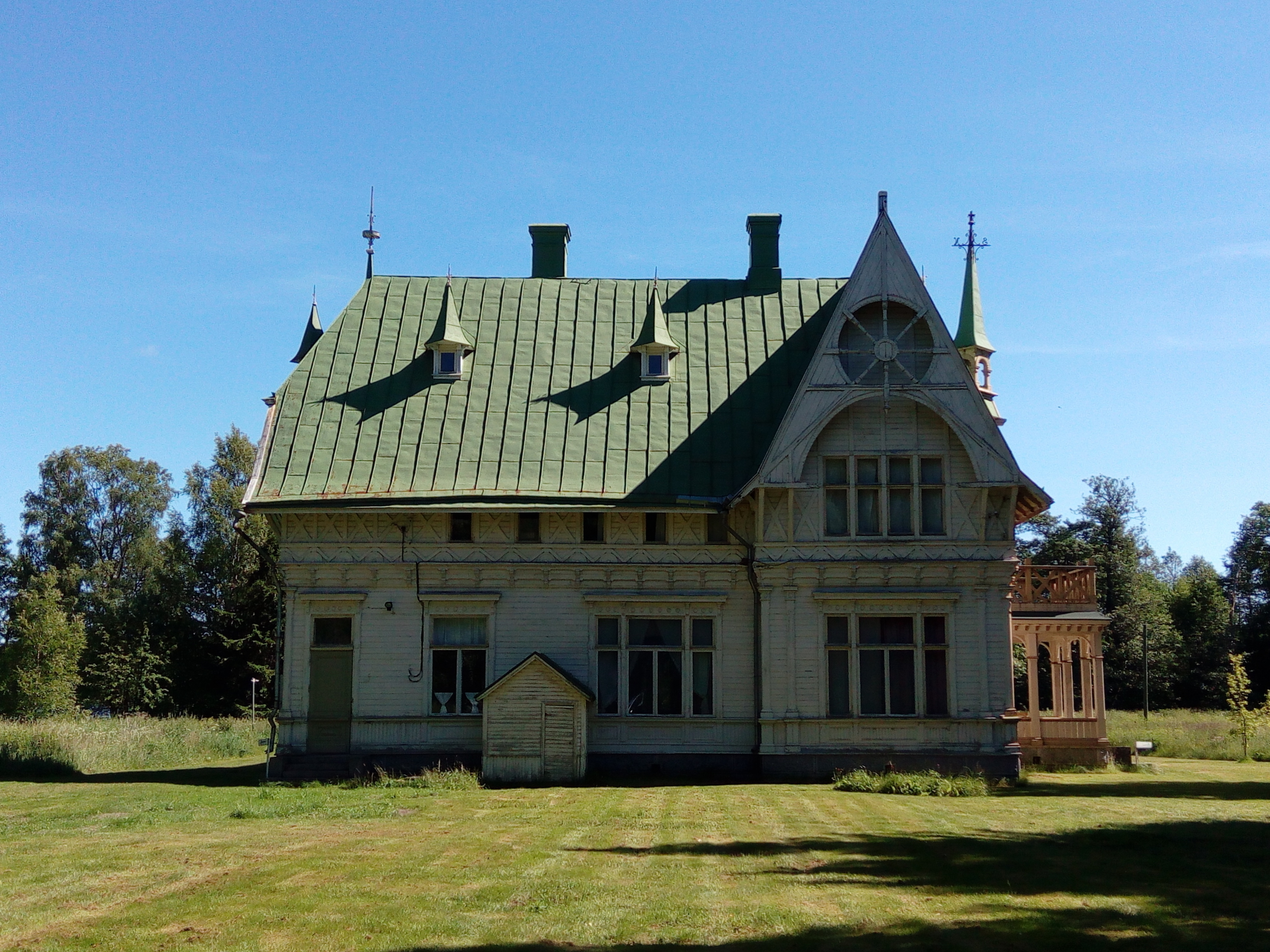 Carlsro